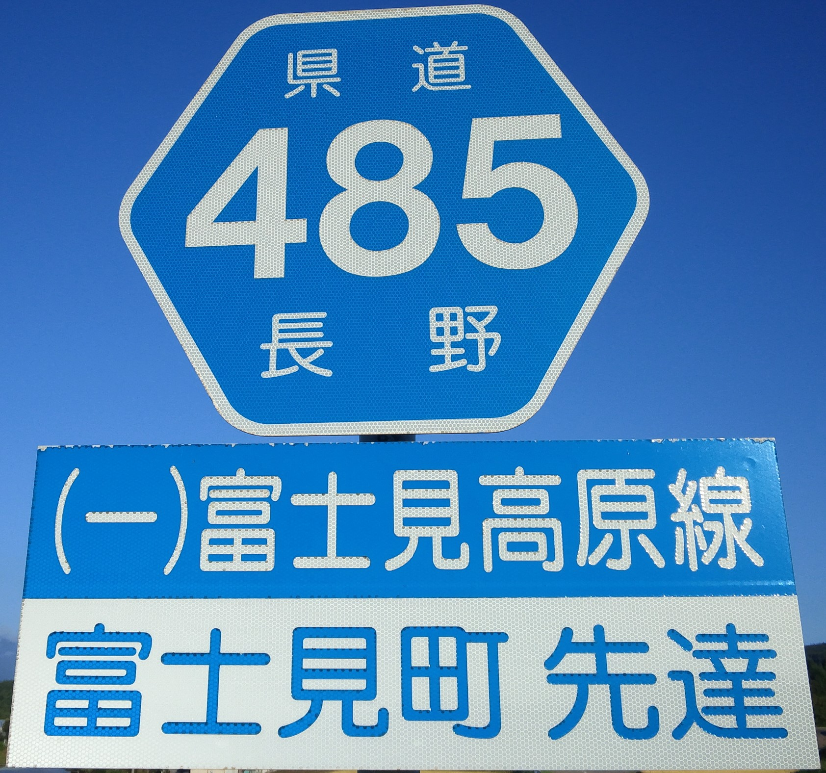 長野県道485号線の路線番号標識